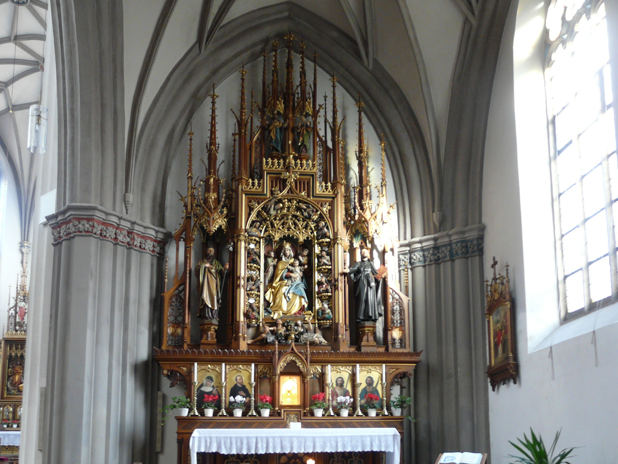 A side altar, St. Martin, Kaufbeuren, Germany